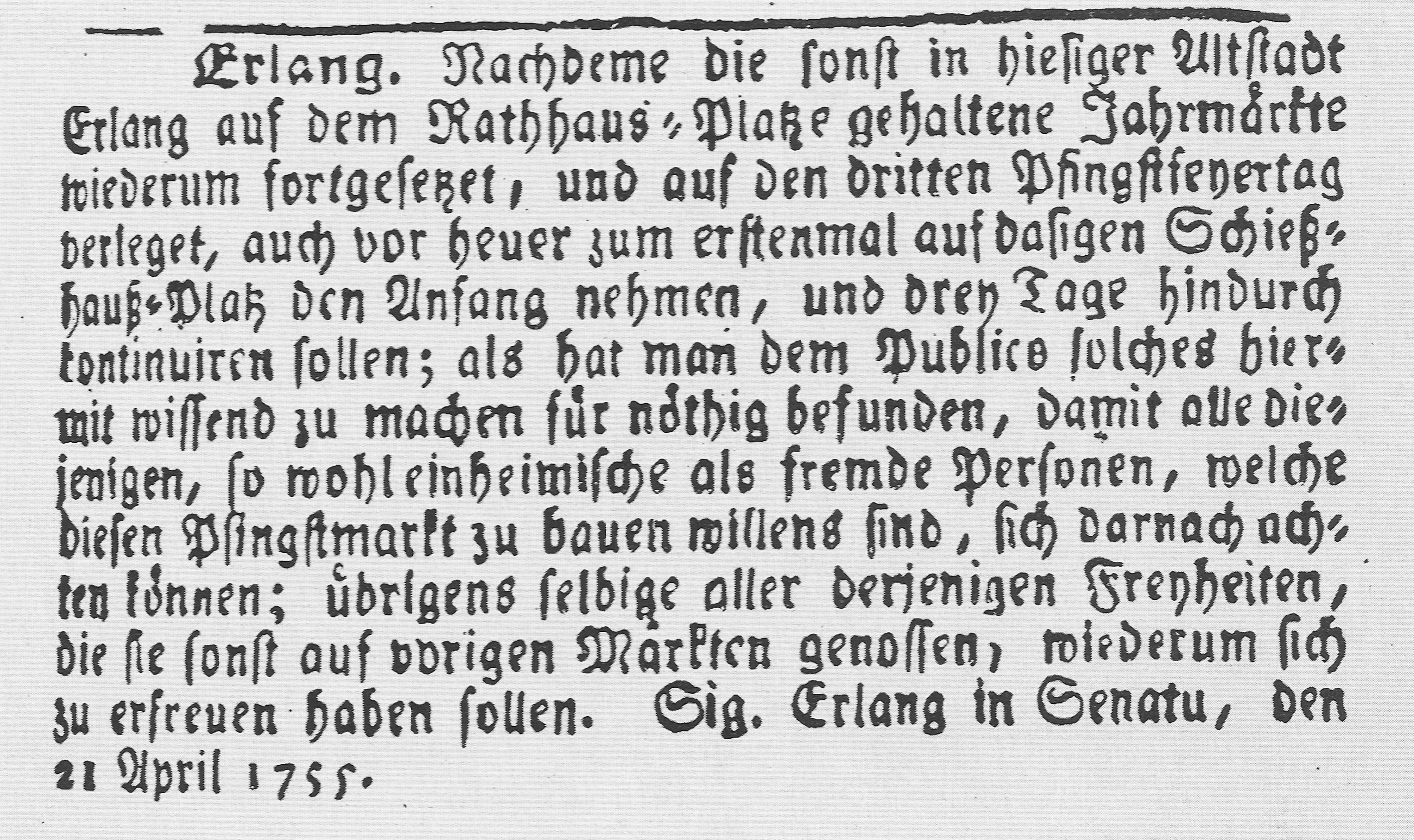 Die Anzeige in der Zeitung Auszug der neusten Weltgeschichte und schönen Wissenschaften (1755) zur ersten Bergkirchweih in Erlangen